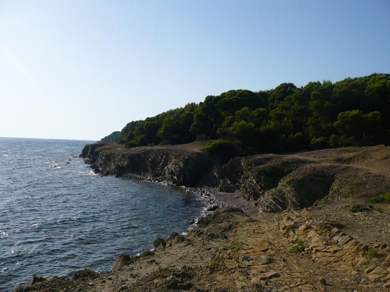 Una caletta di Licosa (castellabate)